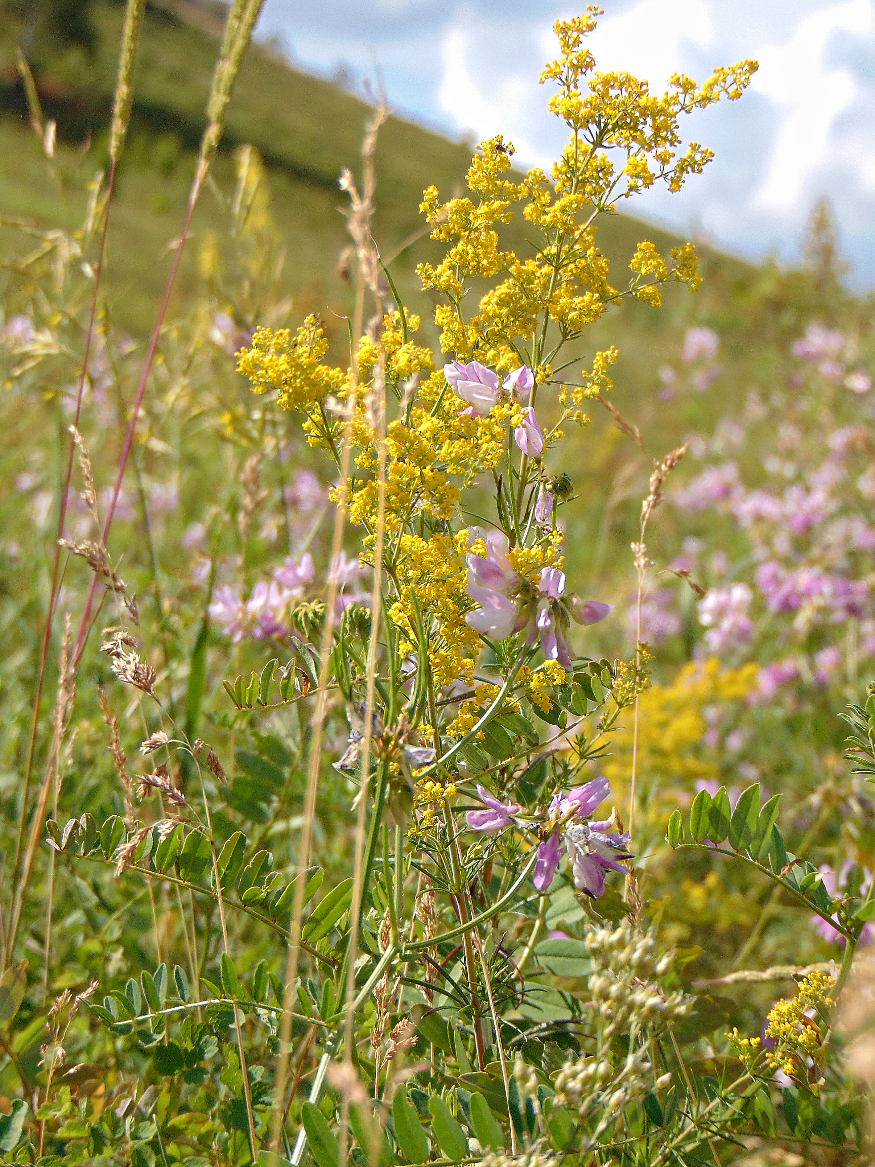 Гора Тра-тау: Ишимбайский район, Башкортостан This image is related to the protected area of Russia number 0210153